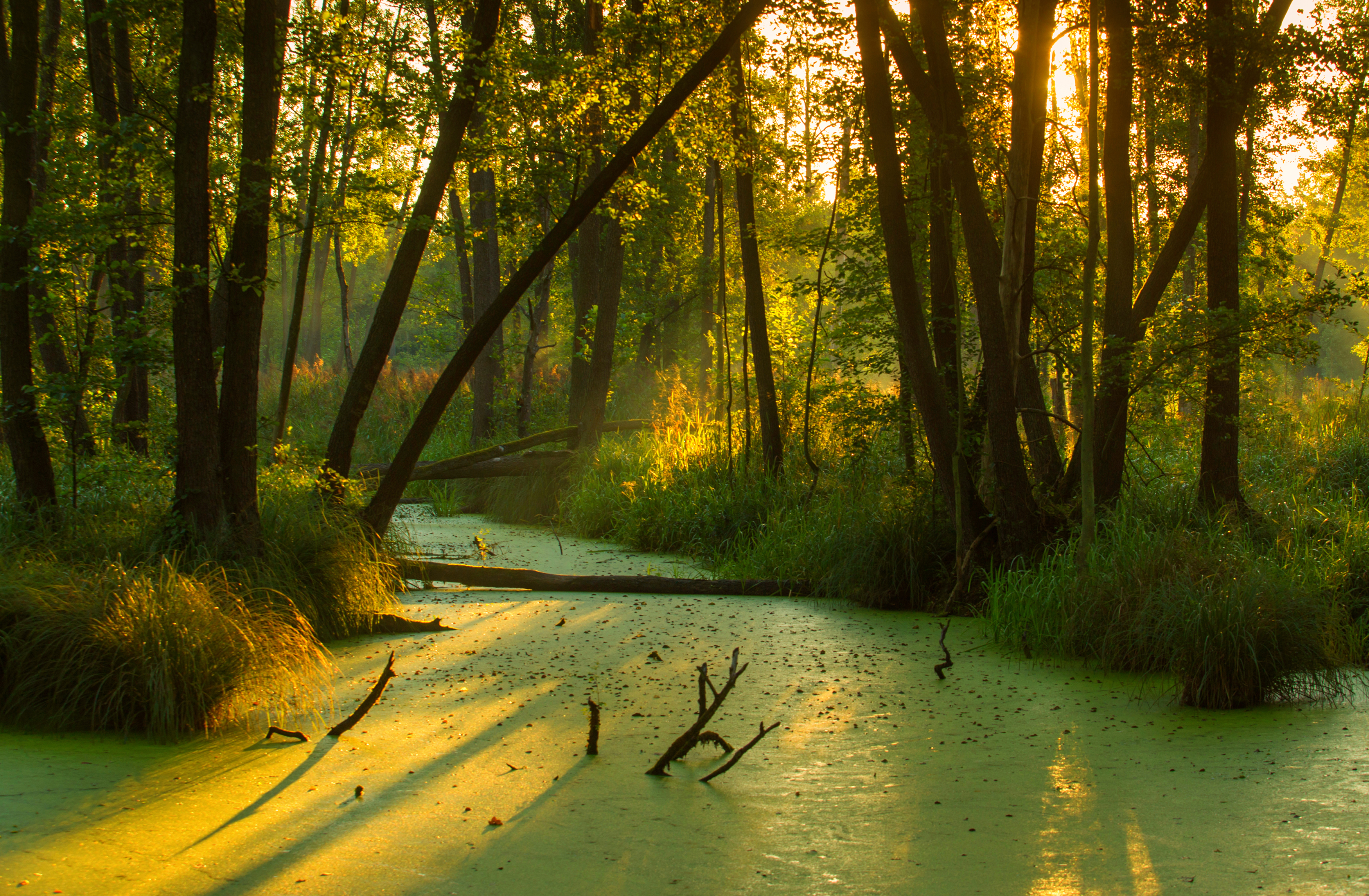 Park krajobrazowy: Park Krajobrazowy Dolina Baryczy This is a photography of protected area with CRFOP ID PL.ZIPOP.1393.PK.137